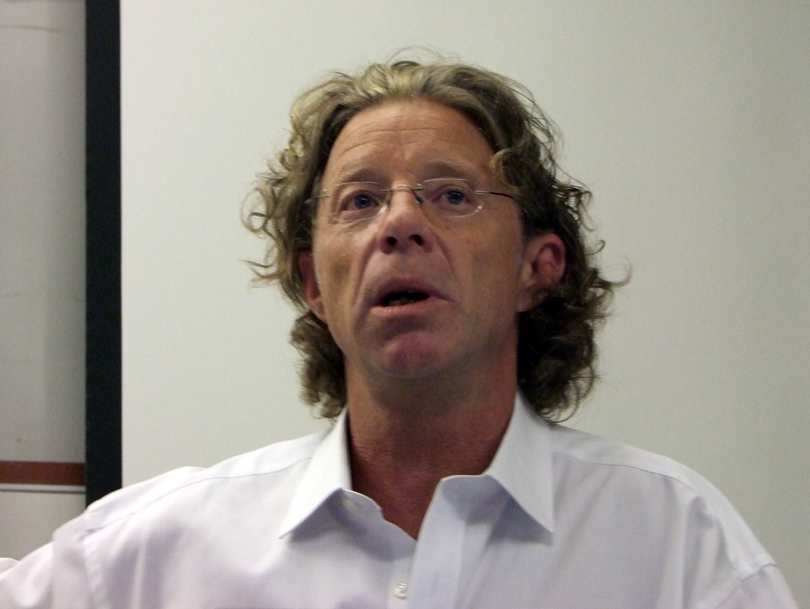 Posted via email from TEU